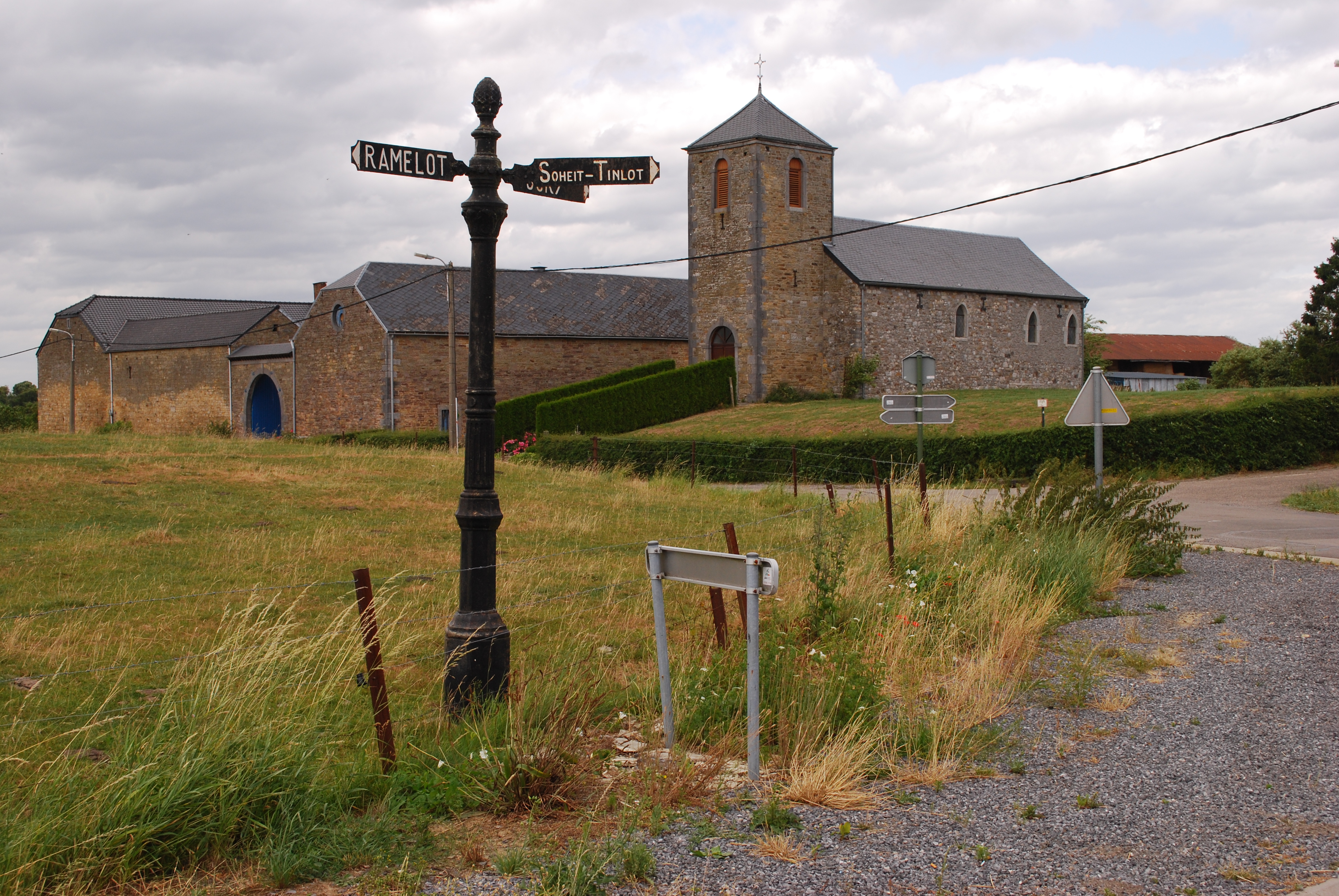 La chapelle Saint-Donat à Abée.